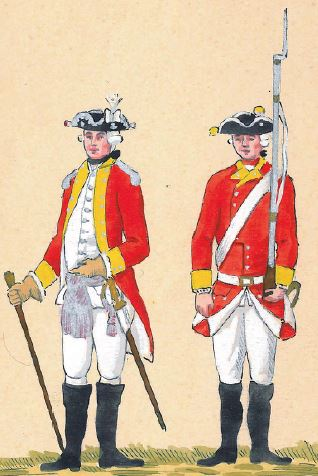 45. Regiment Pieszy Ordynacji Rydzyńskiej